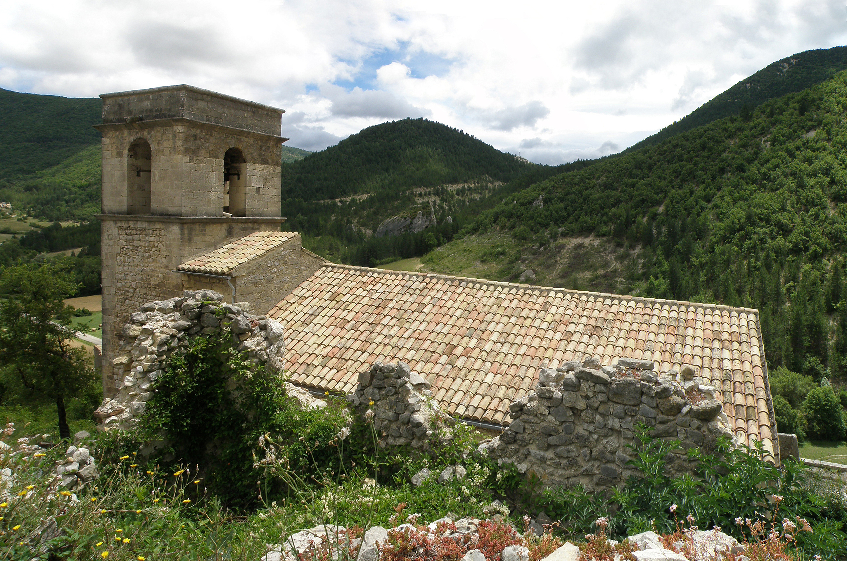 Reilhanette (Drôme, France). Église Saint-Michel et Saint-Hippolyte.